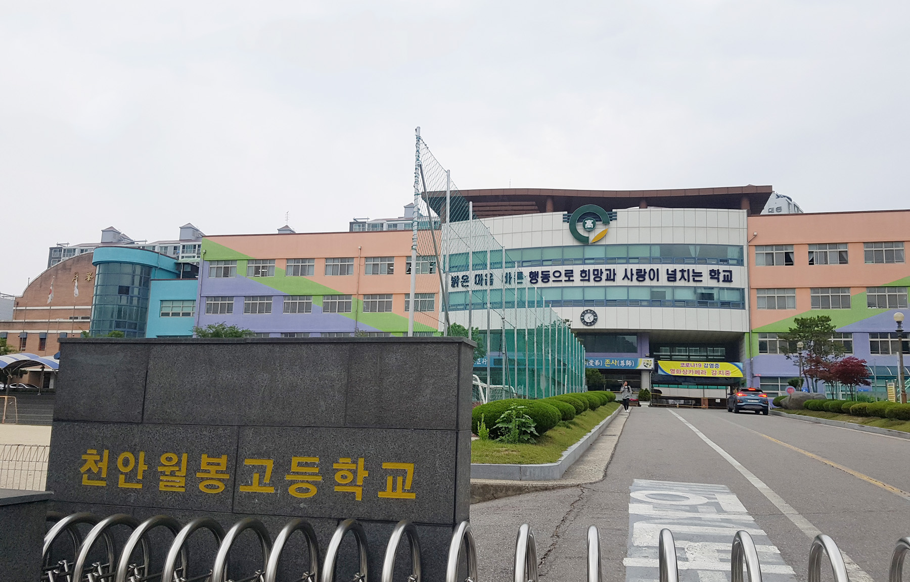 천안 월봉고등학교